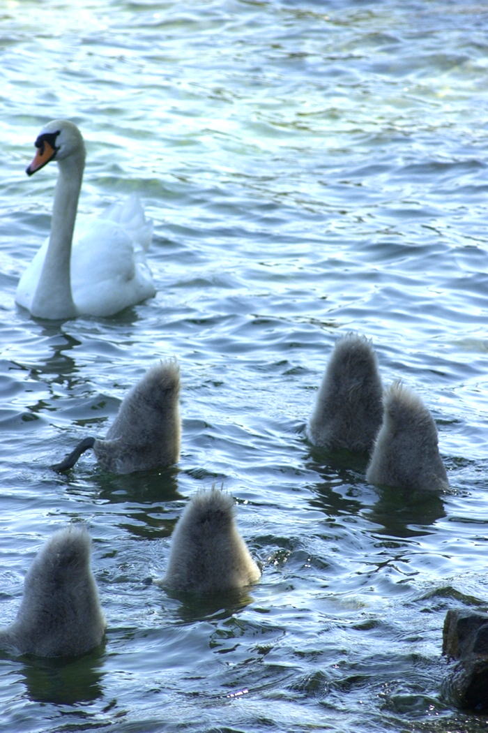 Cygnes à Genève